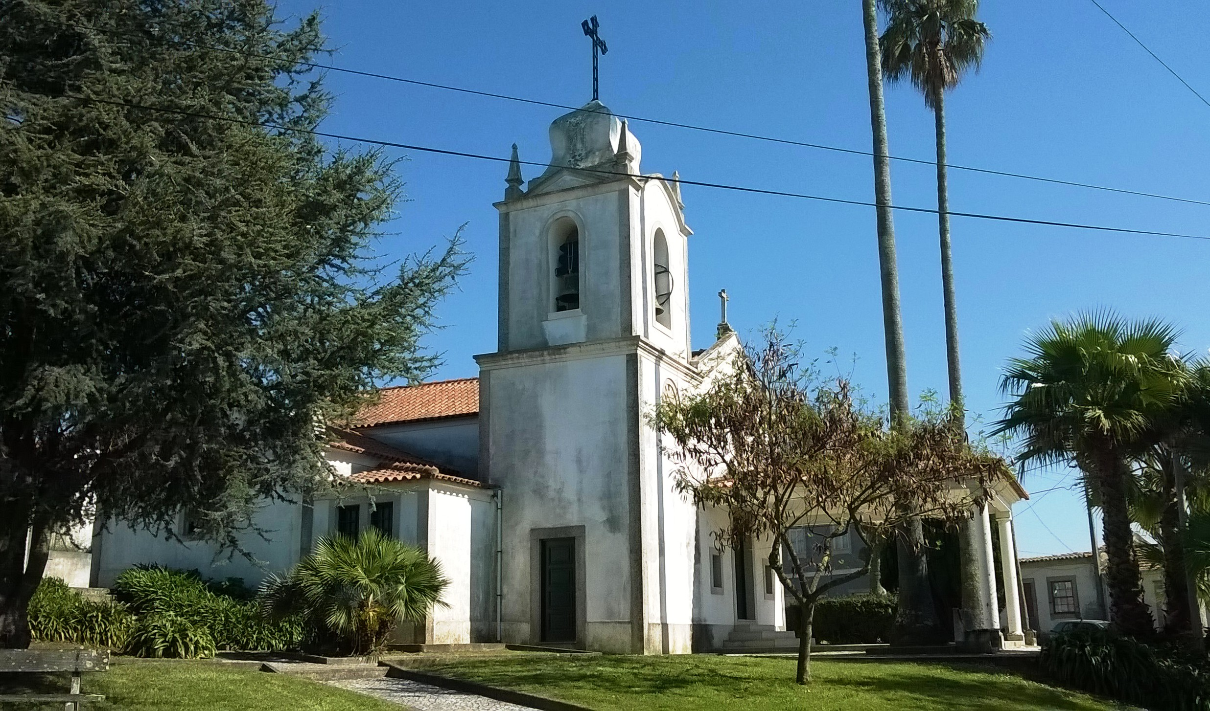 Capela de Nossa Senhora da Penha de França, Esmoriz, concelho de Ovar, distrito de Aveiro, Portugal.